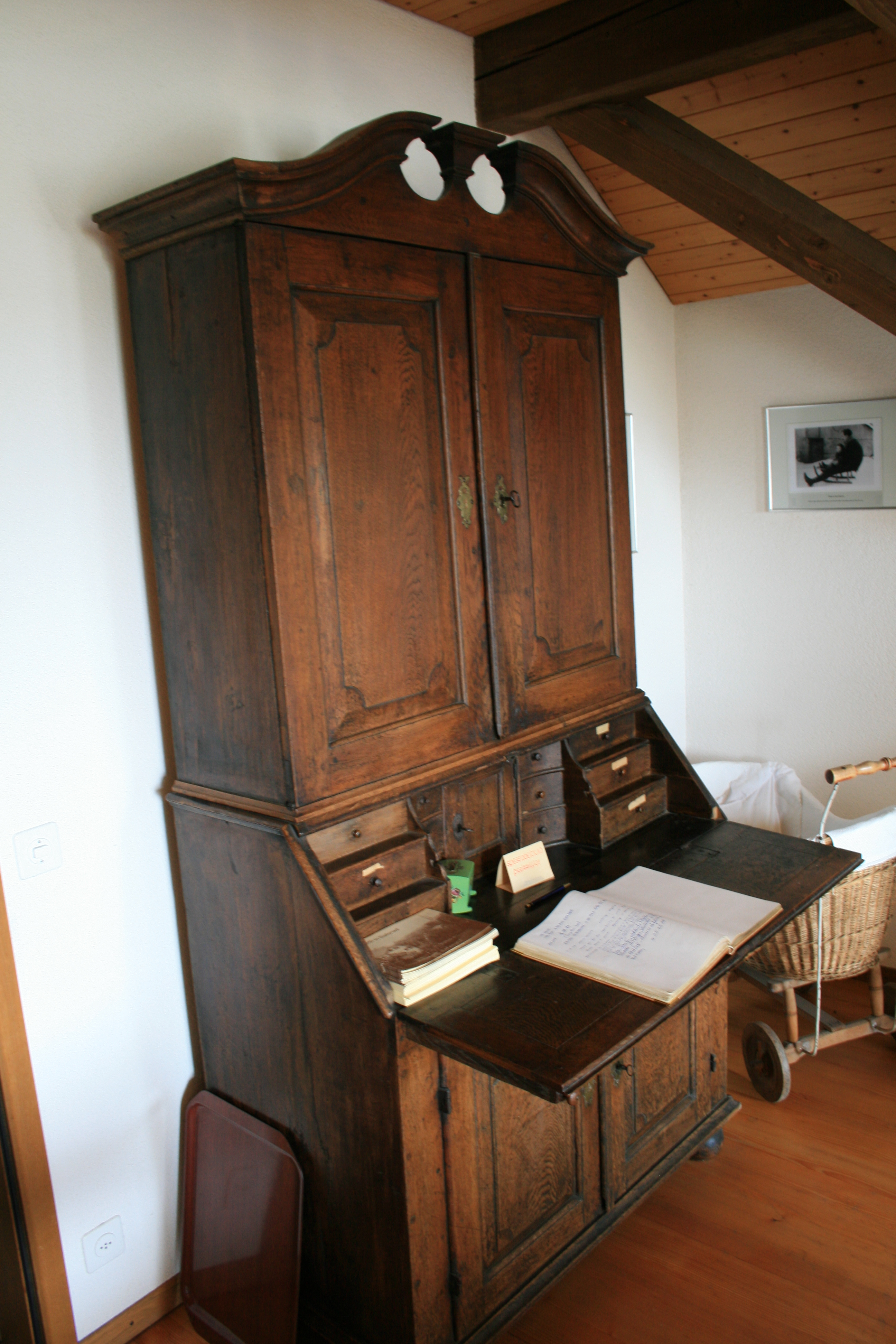 Karl-Barth-Stube im ehemaligen Pfarrhaus in Safenwil AG, Switzerland